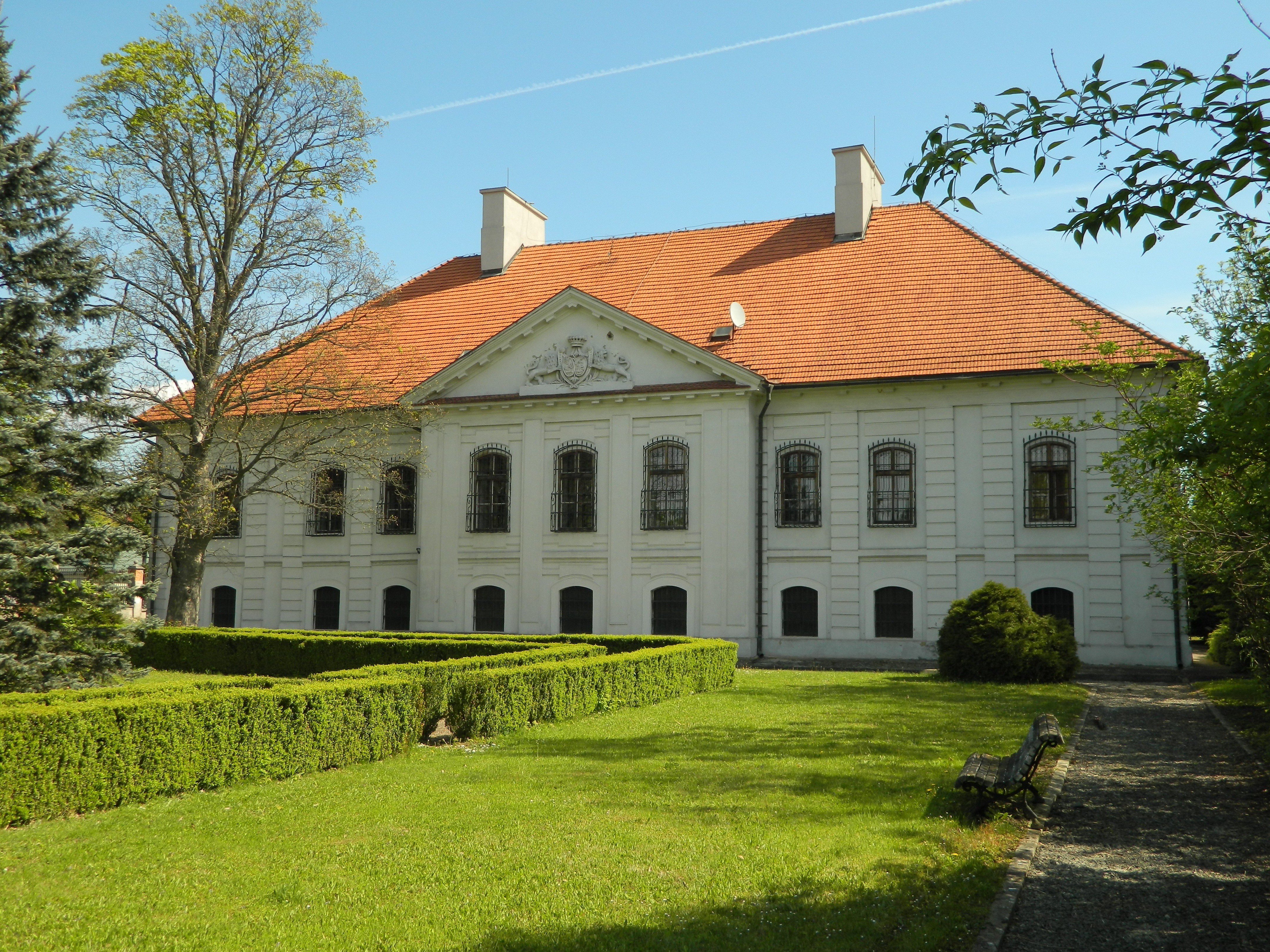 Budimírsky kaštieľ